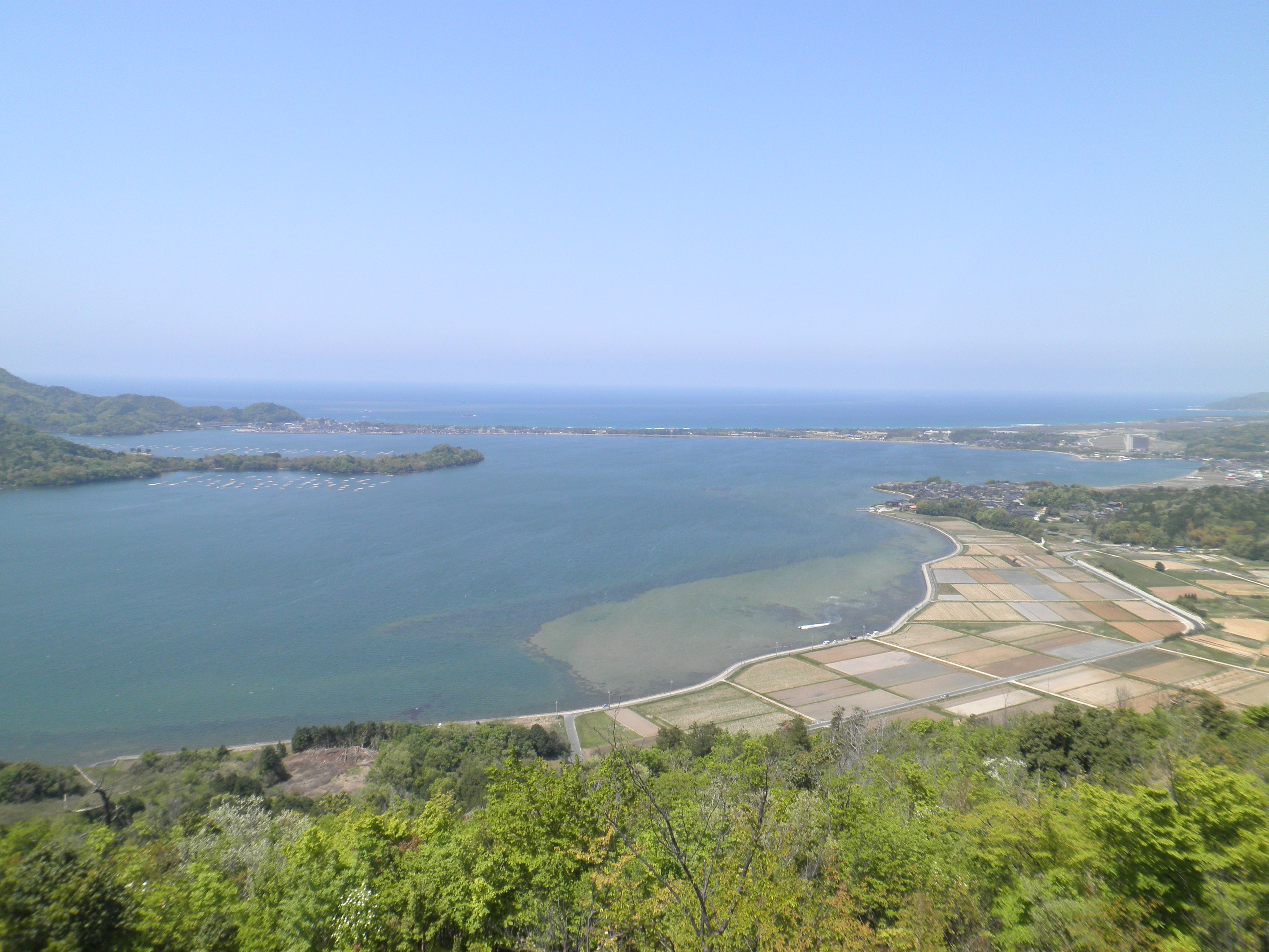 京都府京丹後市の兜山山頂から北を向いて観た久美浜湾